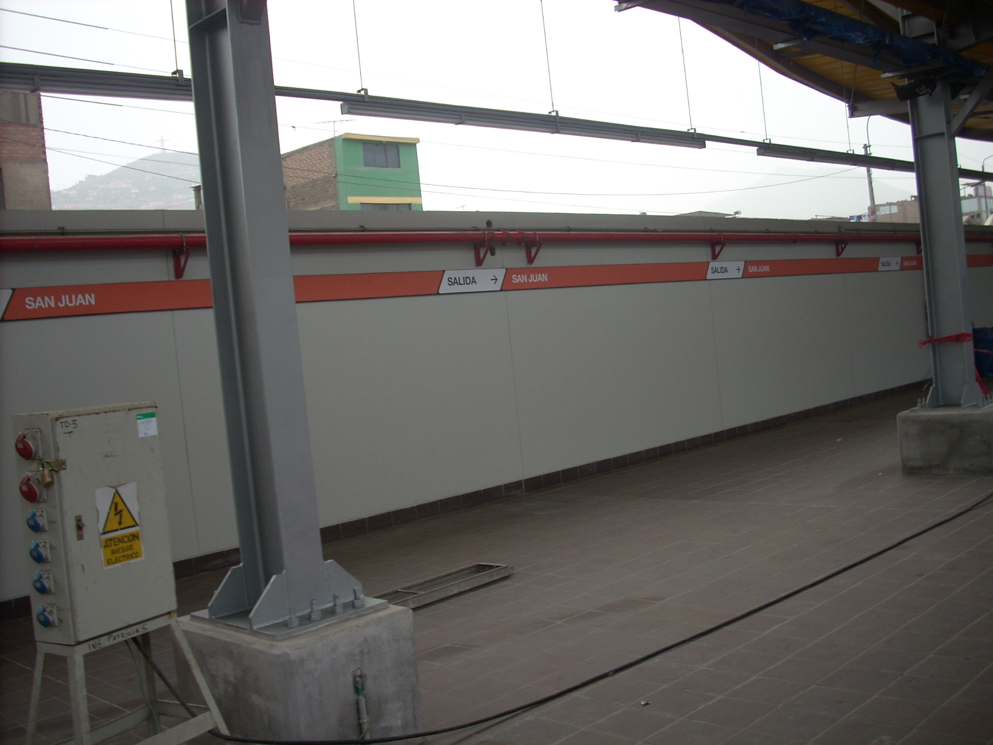 Estacion ubicada cerca a la esquina de la Av. San Juan con Av. Los Heroes. Plataforma en direccion Sur.